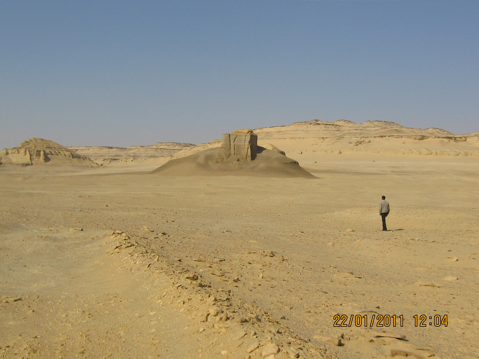 مصرى: مجموعه من الأصدقاء تقوم برحله الى محمية قارون بمحافظة الفيوم وهى مكان جيولوجى قديم جدا يعود الى عصور جيولوجيه من ملايين السنين , المكان به تكوينات ذات أشكال غريبه من نحت الطبيعه , كما يوجد به بحيرة قارون وهى من أقدم البحيرات الطبيعيه فى العالم , مع ممارسة رياضة التسلق. This is an image with the theme "Play" from: Egypt